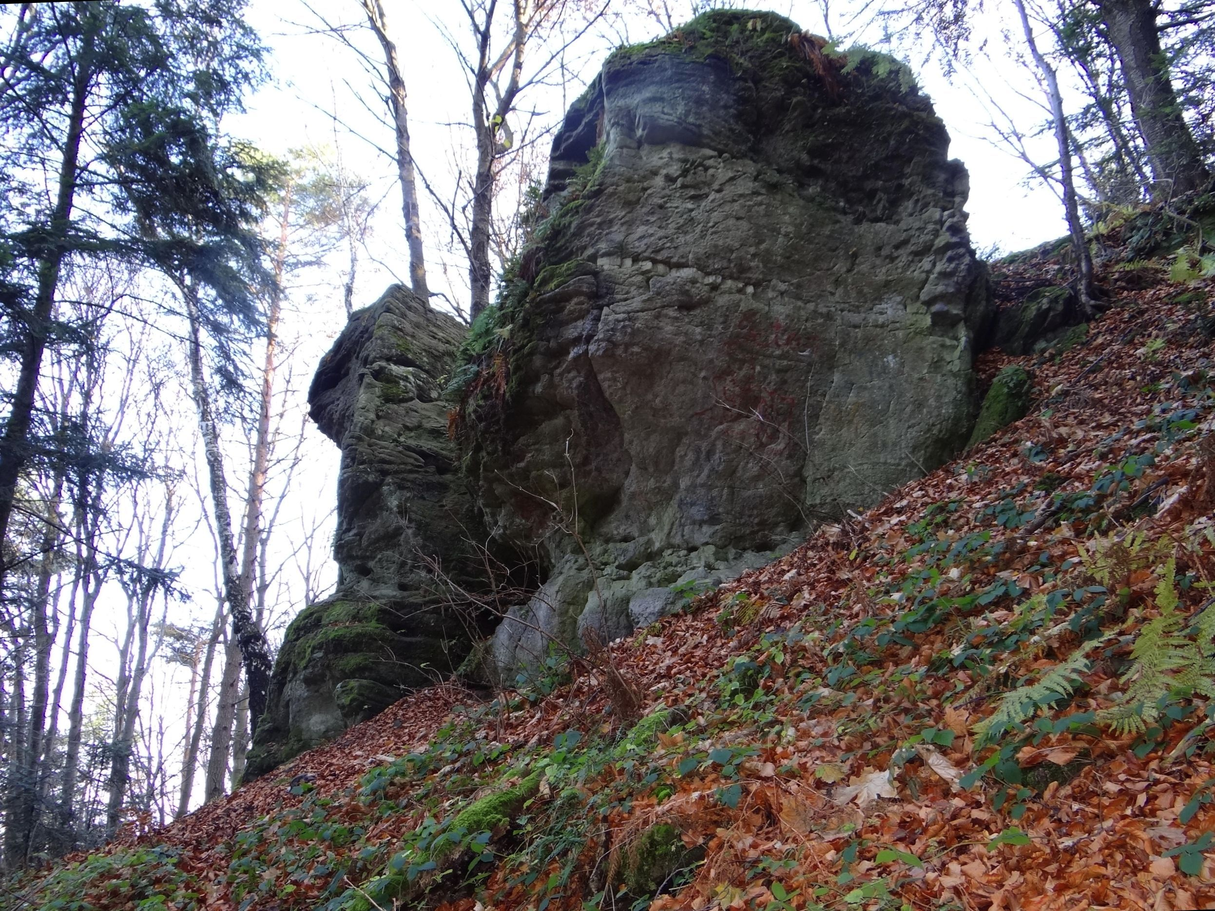 Diabelski Kamień w Stróży